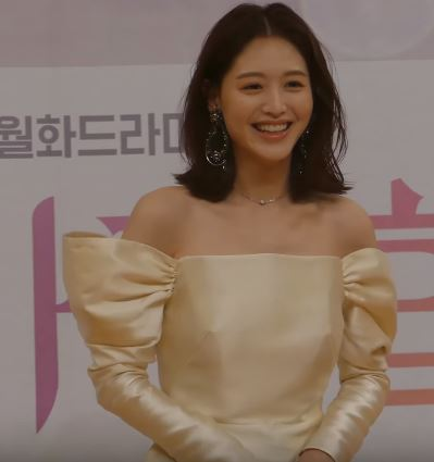 5월 3일 오전 서울시 양천구 목동 SBS에서 SBS 새 월화드라마 '초면에 사랑합니다' 제작발표회가 열려 배우 김영광X진기주X김재경X구자성 이 참석해 포토타임을 갖고 있다.